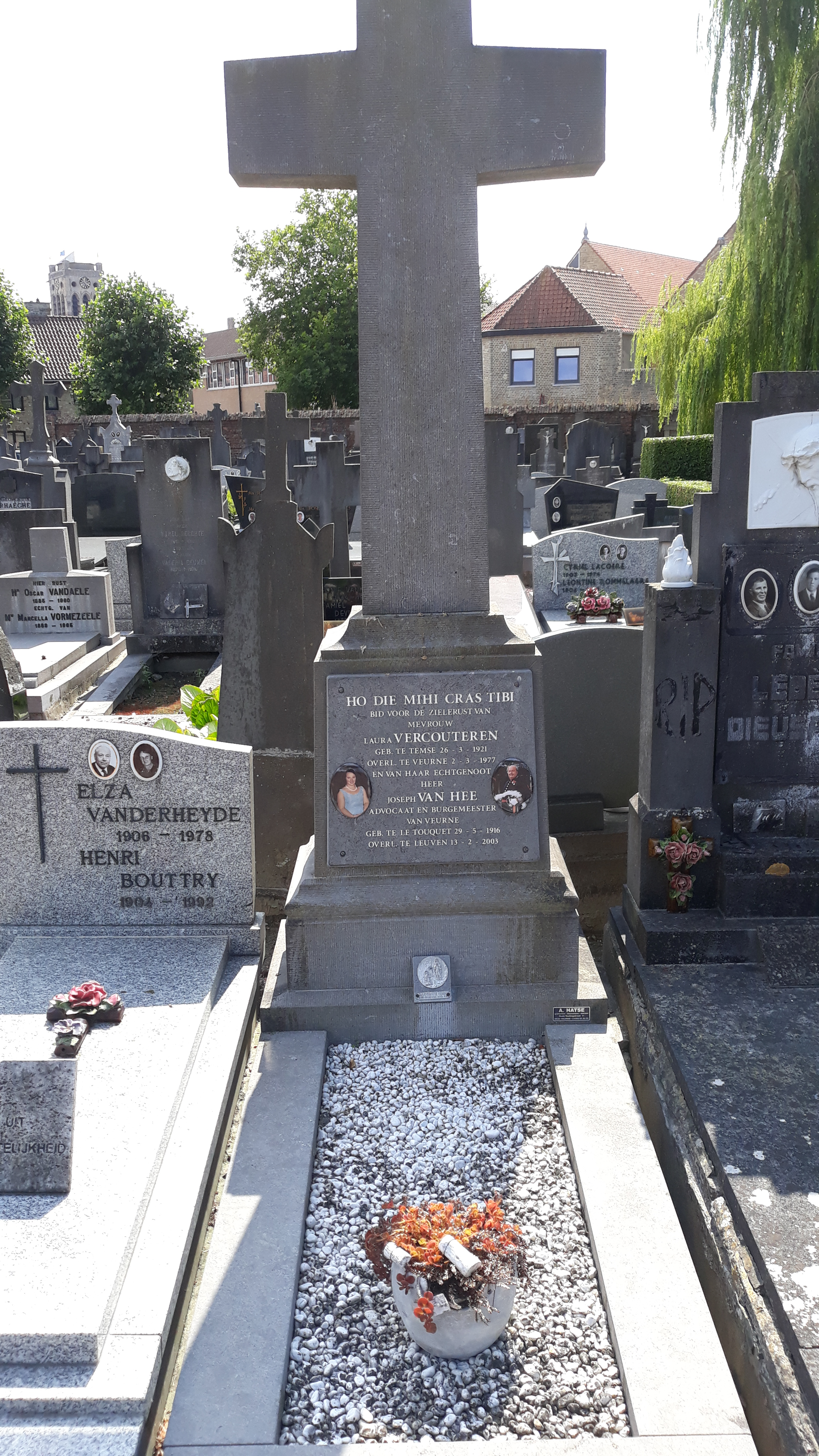 Das Grab des belgischen Kommunalpolitikers (Bürgermeister Veurne) Joseph van Hee und seiner Ehefrau Laura Vercouteren auf dem Friedhof von Veurne (West-Vlaanderen, Belgien).